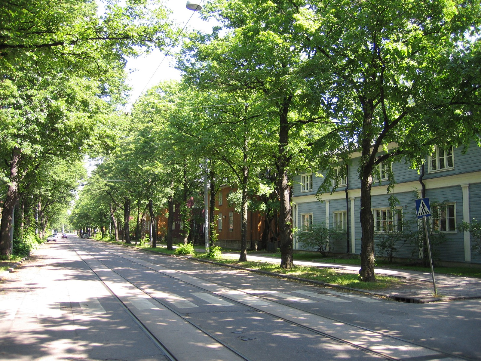 Pohjolankatu/Pohjolagatan in Käpylä, Helsinki, Finland